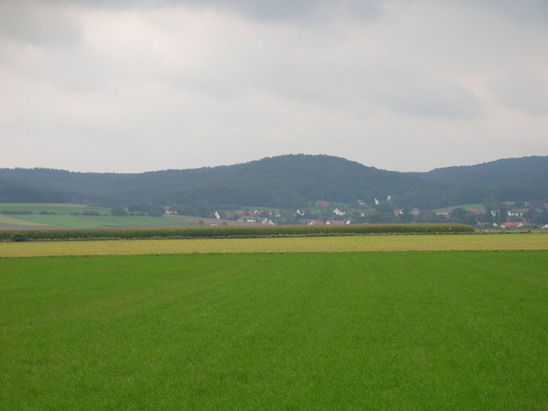 Lübbecke, Kreis Minden-Lübbecke, Nordrhein-Westfalen: Babilonie über Obermehnen